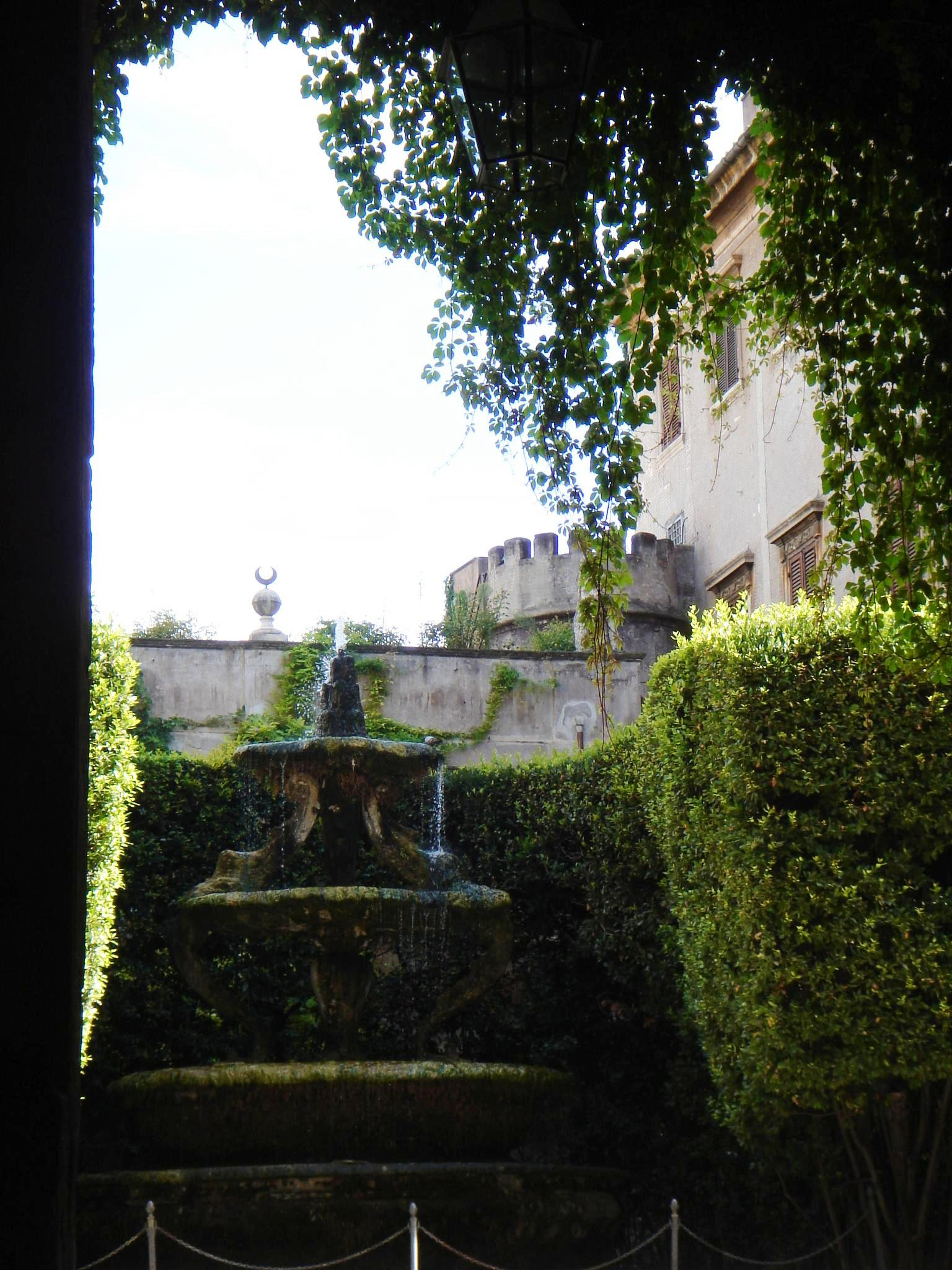 Roma, Palazzo Taverna (Orsini) a Monte Giordano: fontana del cortile